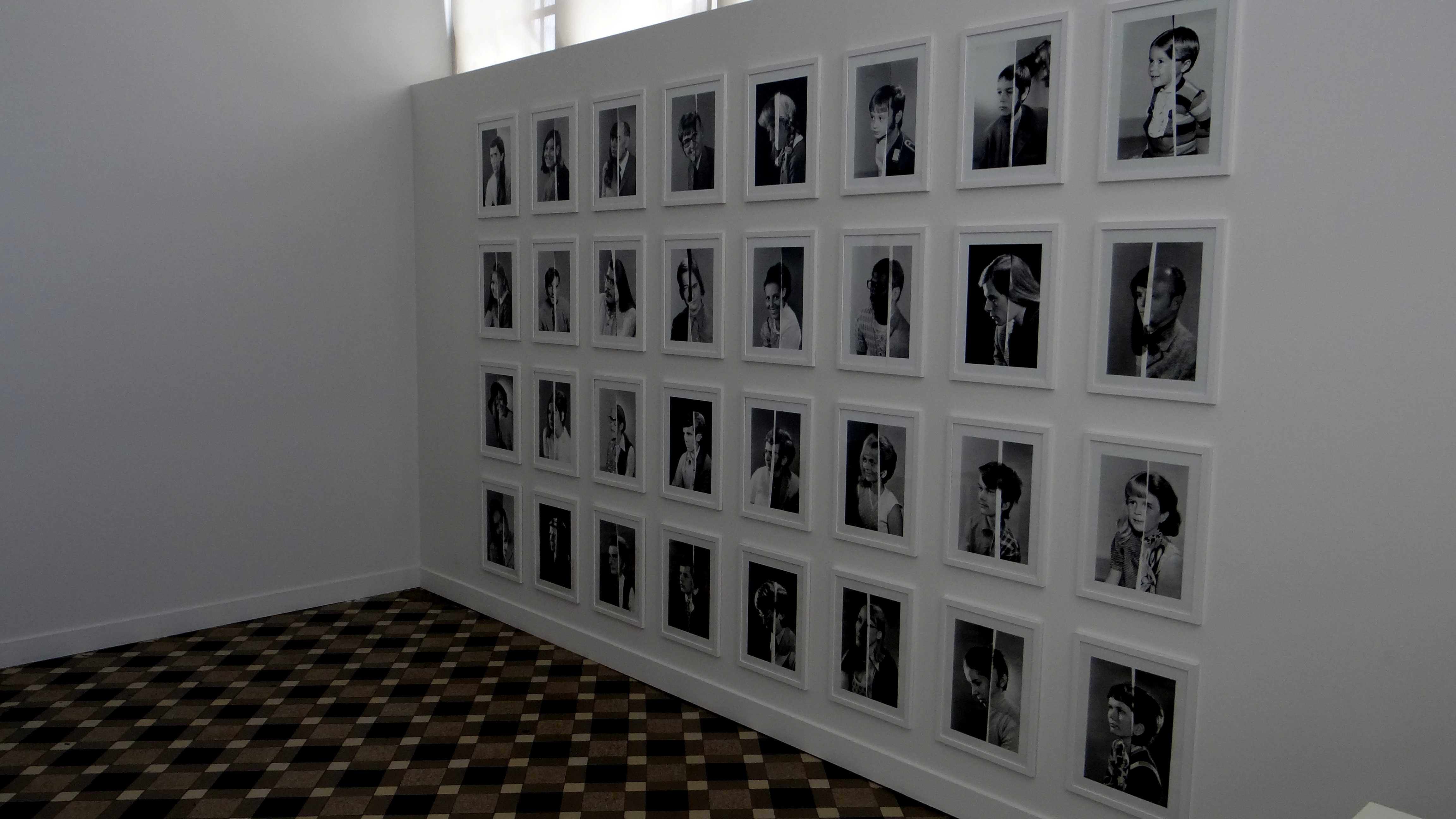 Centre régional de la photographie du Nord Pas-de-Calais - exposition